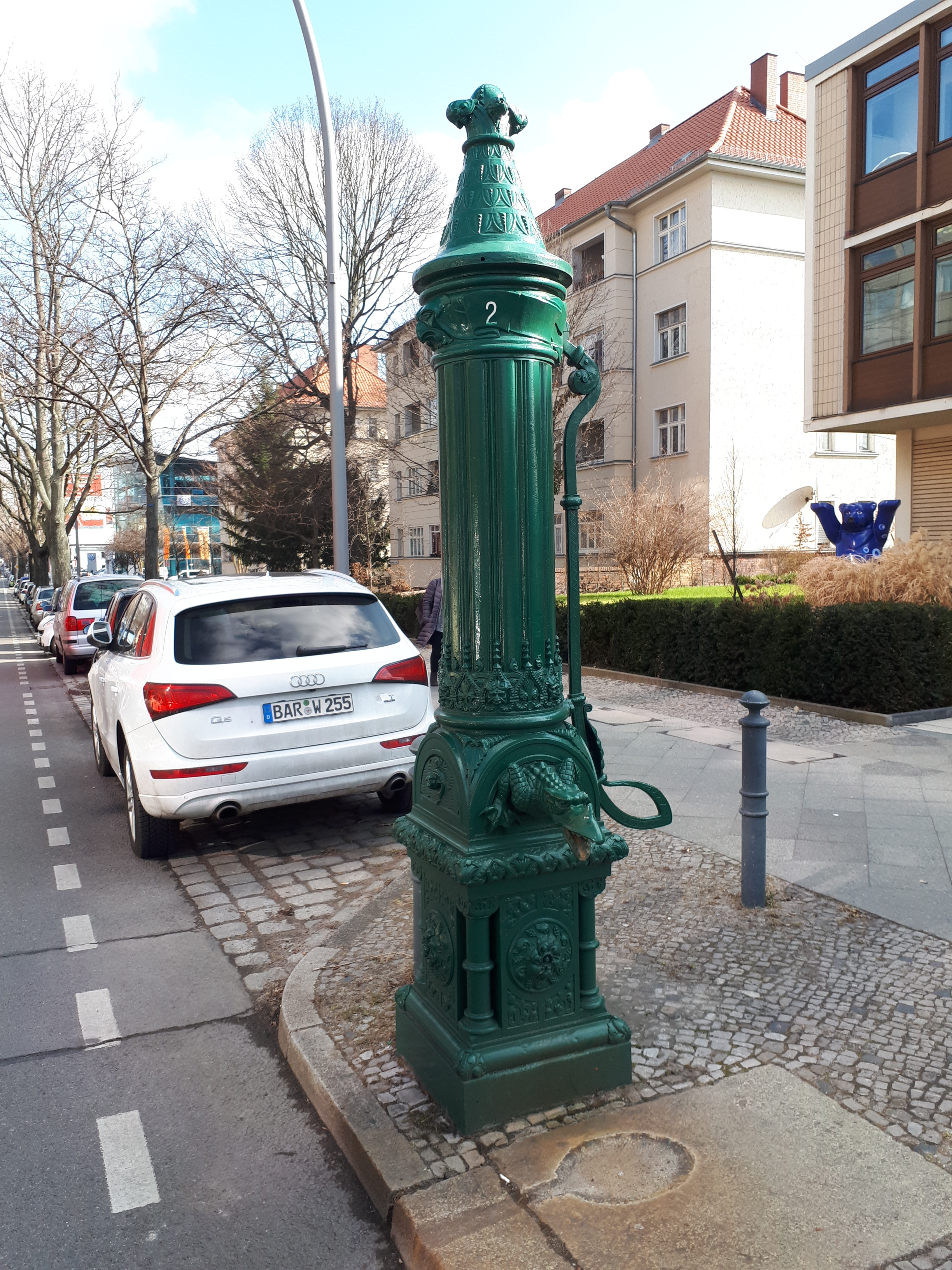 Charlottenburg Franklinstraße Wasserpumpe #2